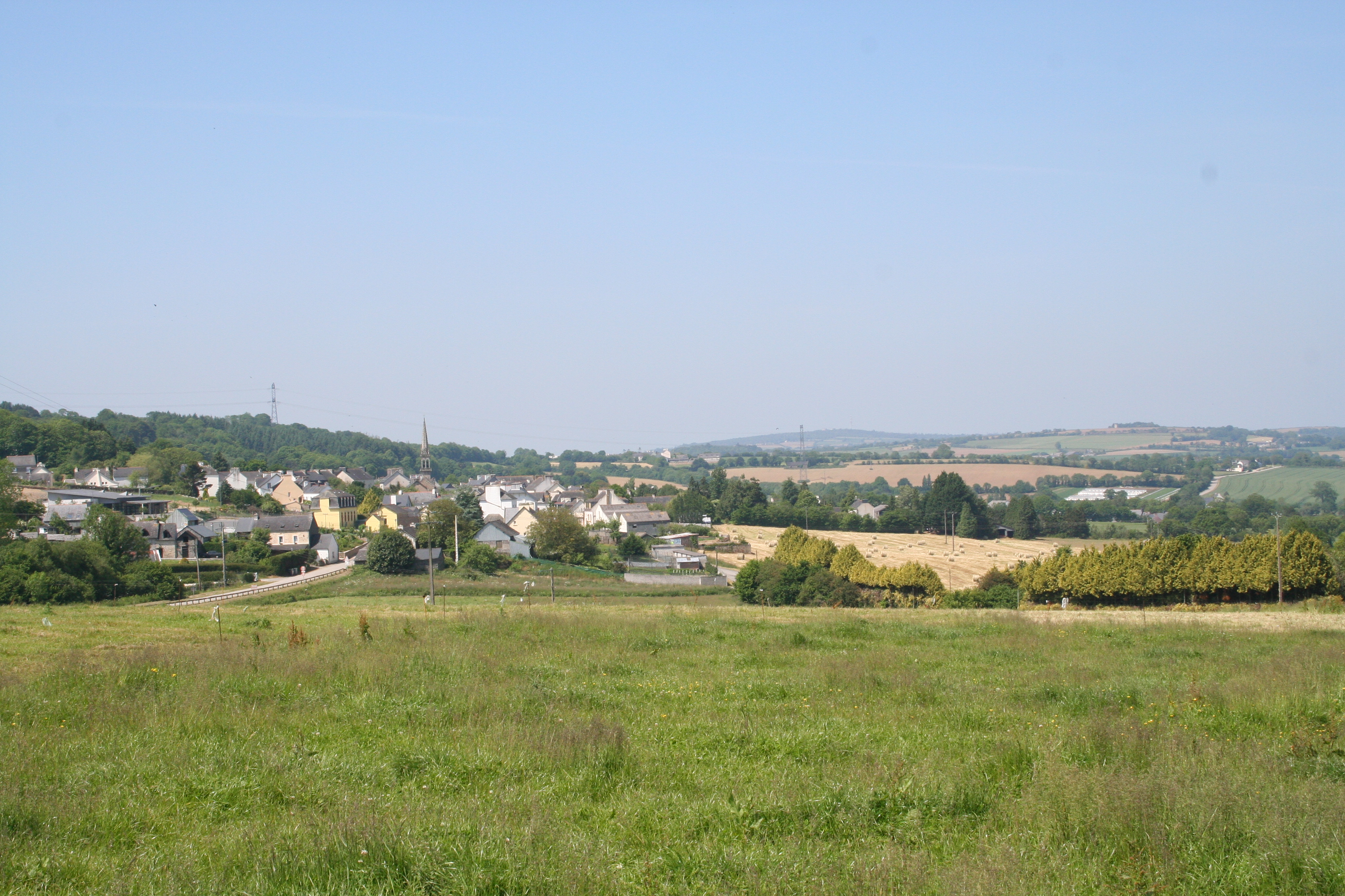 Vue du village de Gouézec dans le Finistère.